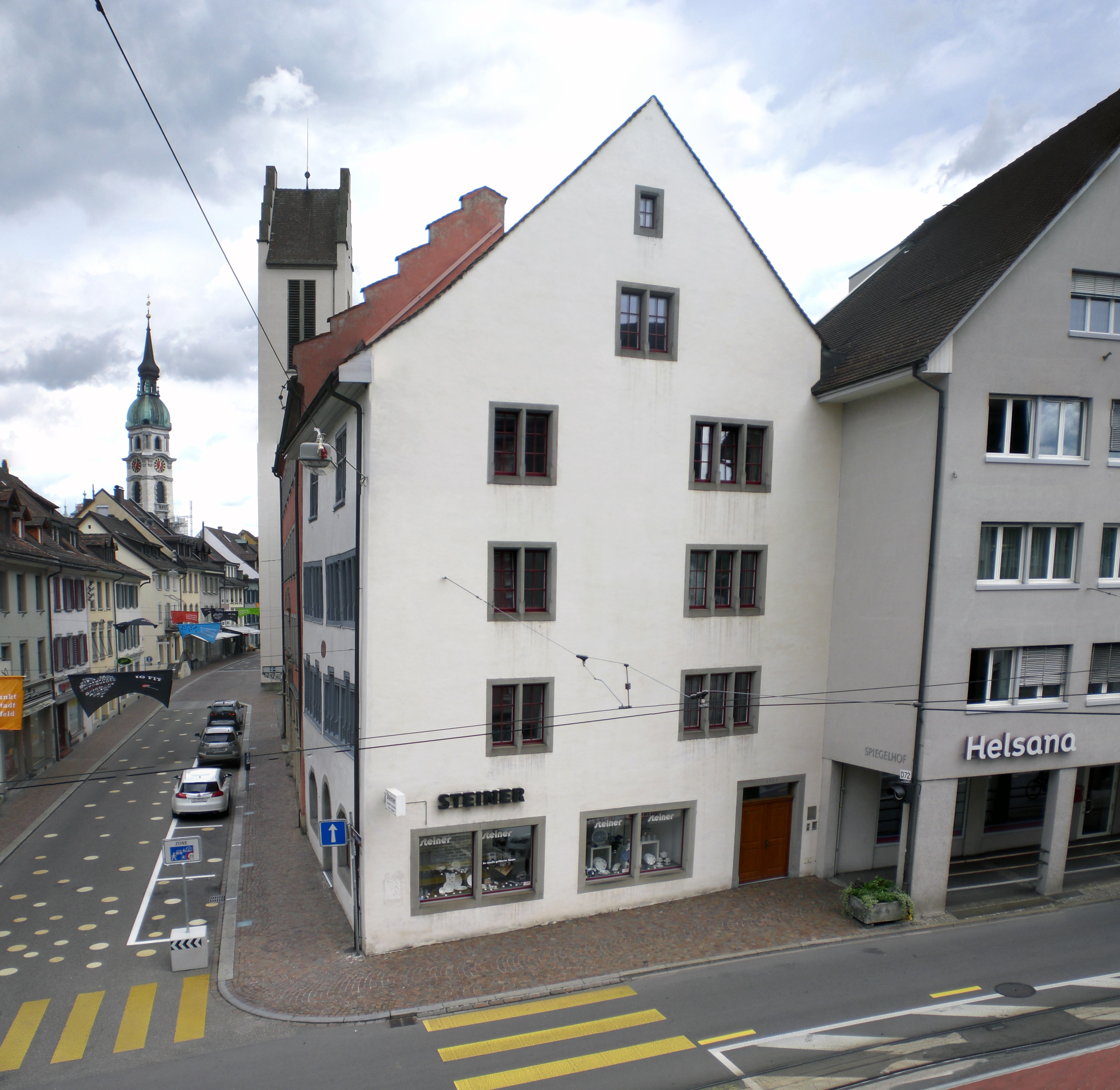 Haus zum Licht, Frauenfeld, Kanton Thurgau